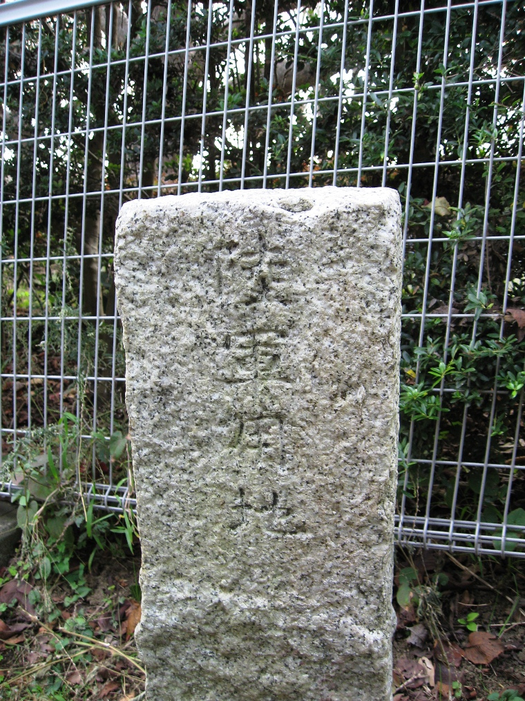 神奈川県横須賀市はまゆう公園敷地周辺に残る陸軍用地標柱